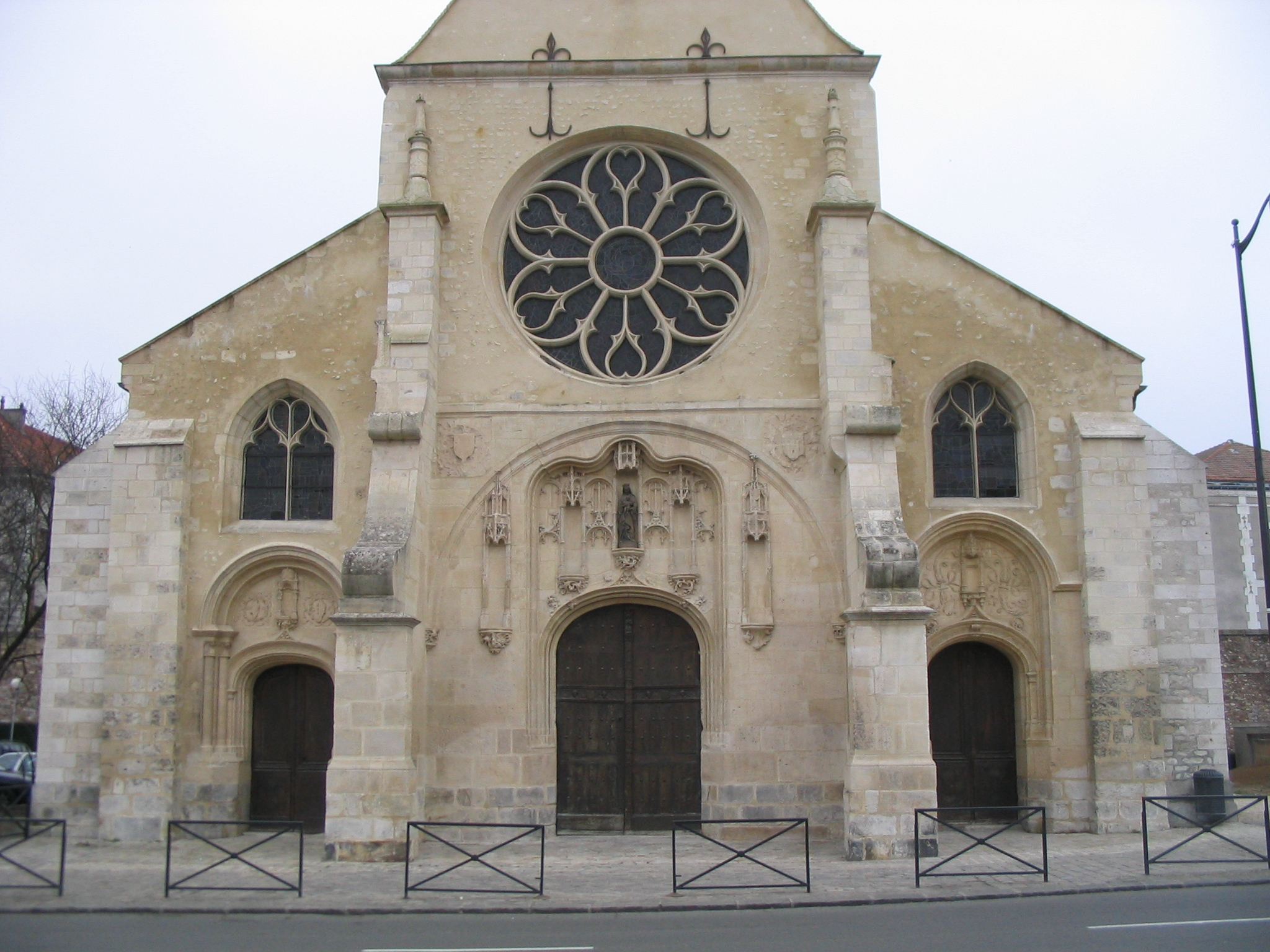 Facade Ouest de la collégiale Notre Dame de Melun.